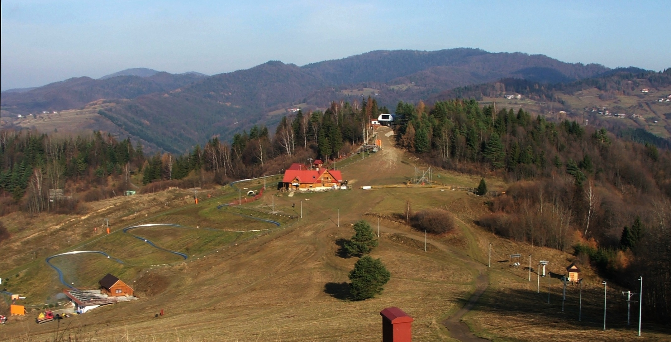 Widok z Szafranówki na Palenicę i Beskid Sądecki z Dzwonkówka